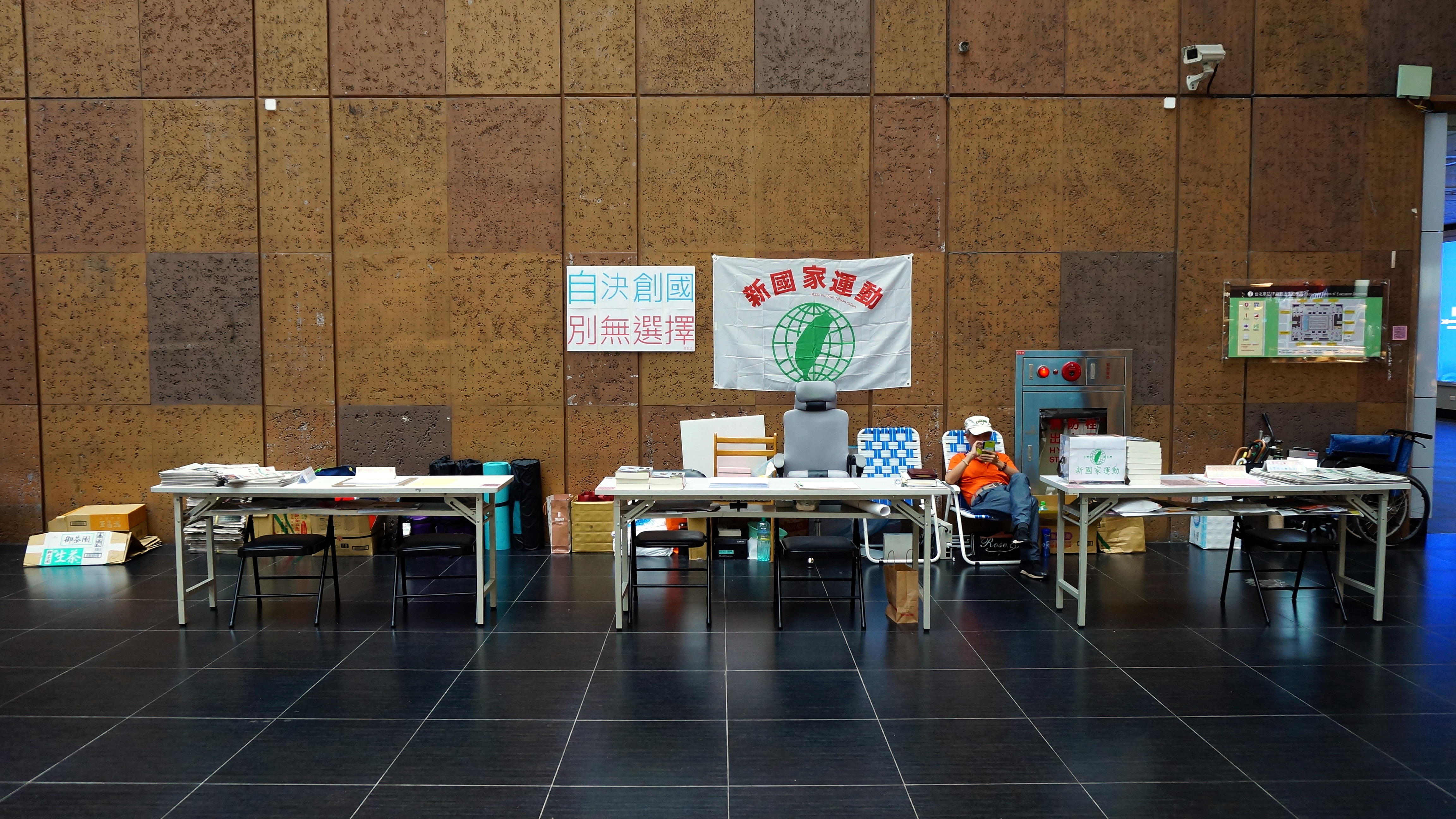 臺灣獨立運動人士黃華於臺灣鐵路管理局臺北車站一樓大廳絕食抗議期間使用的折疊桌，後方貼「新國家運動」旗幟。2019年7月9日黃華停止絕食後，絕食相關標語已全數撤除。